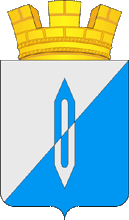 Герб г. Барыш Ульяновской области Coat of arms of Barysh (Ulyanovsk Oblast)